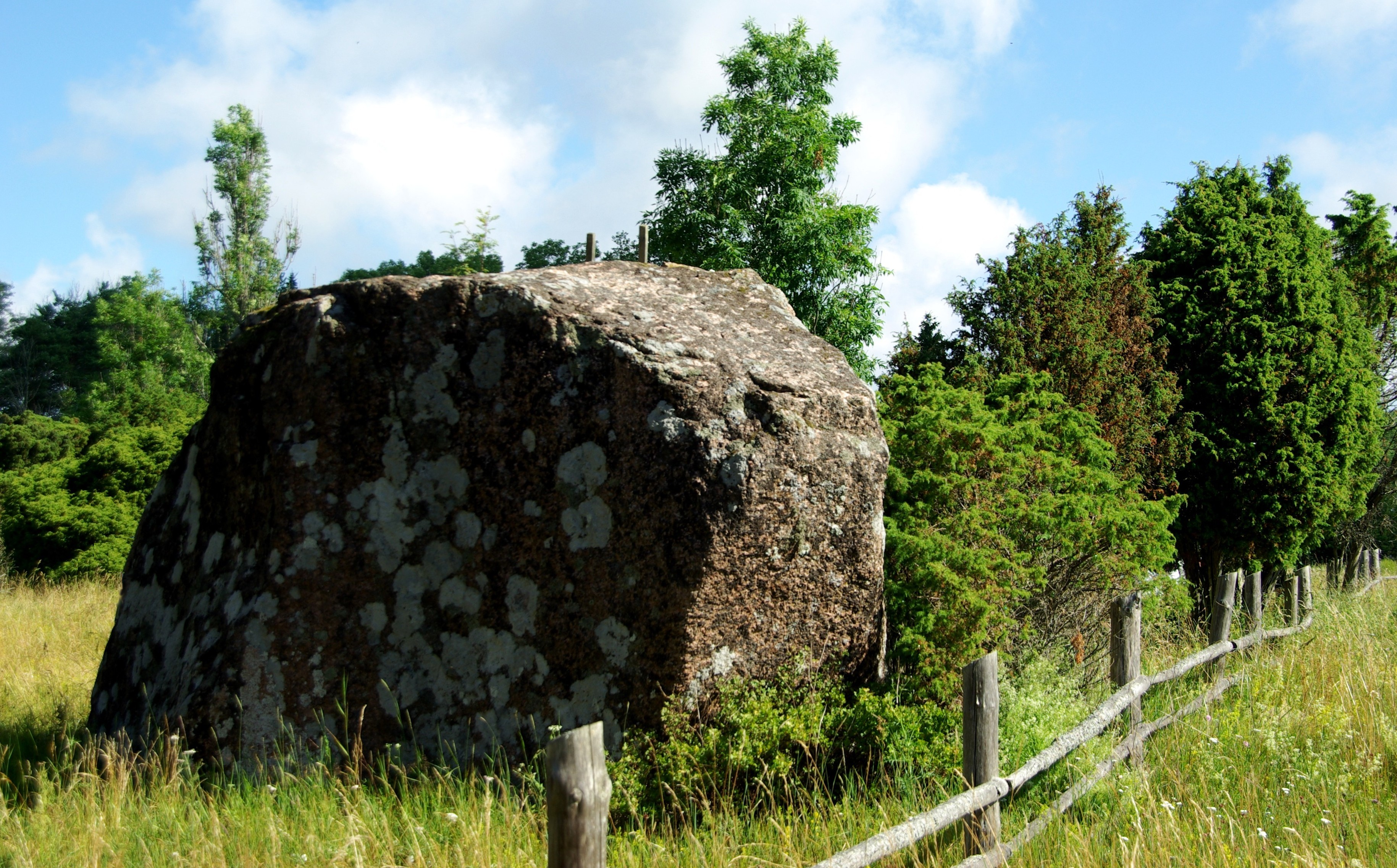 Suurikpõllu suurkivi